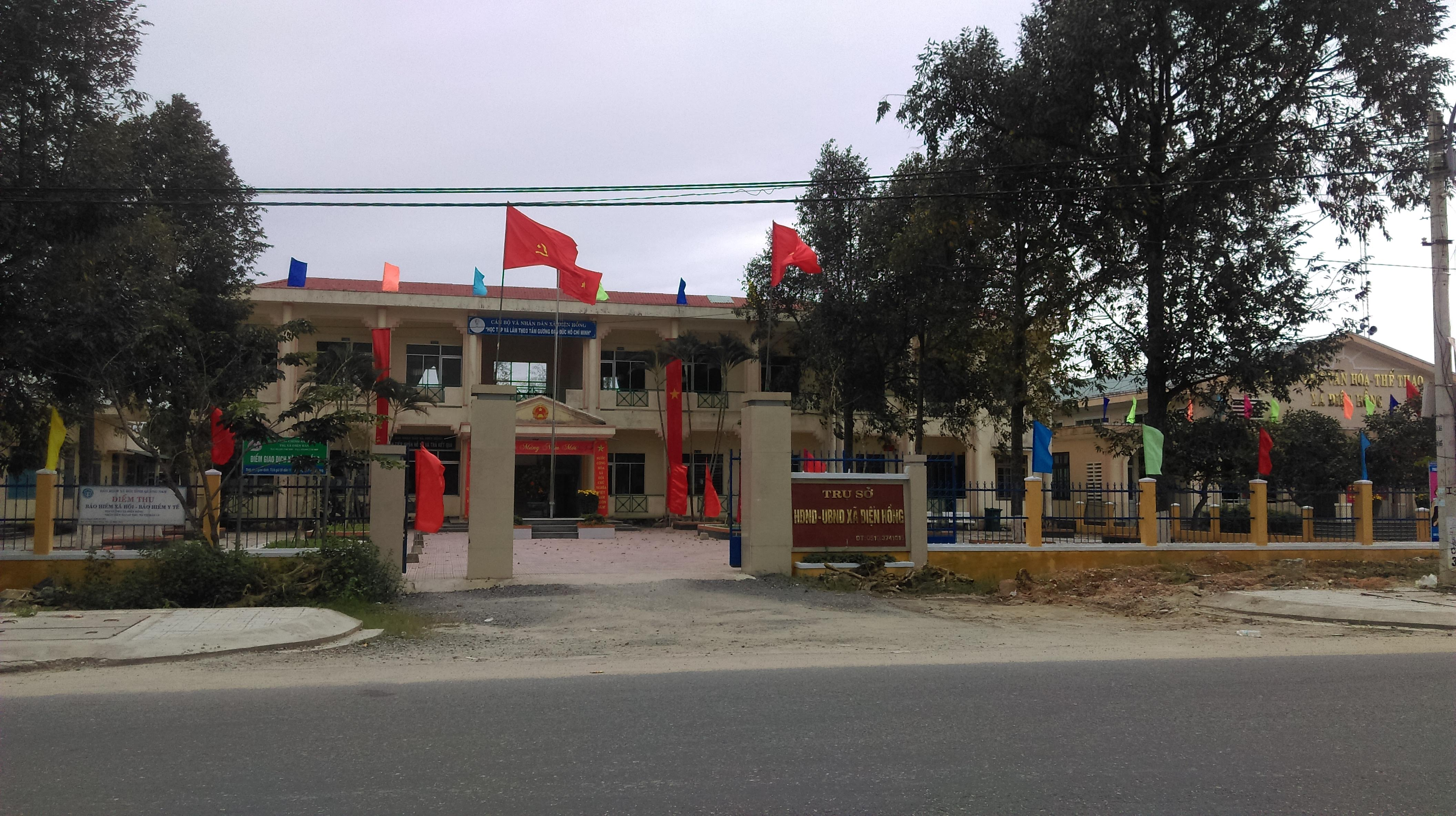 UBND xã Điện Hồng, Điện Bàn, Quảng Nam